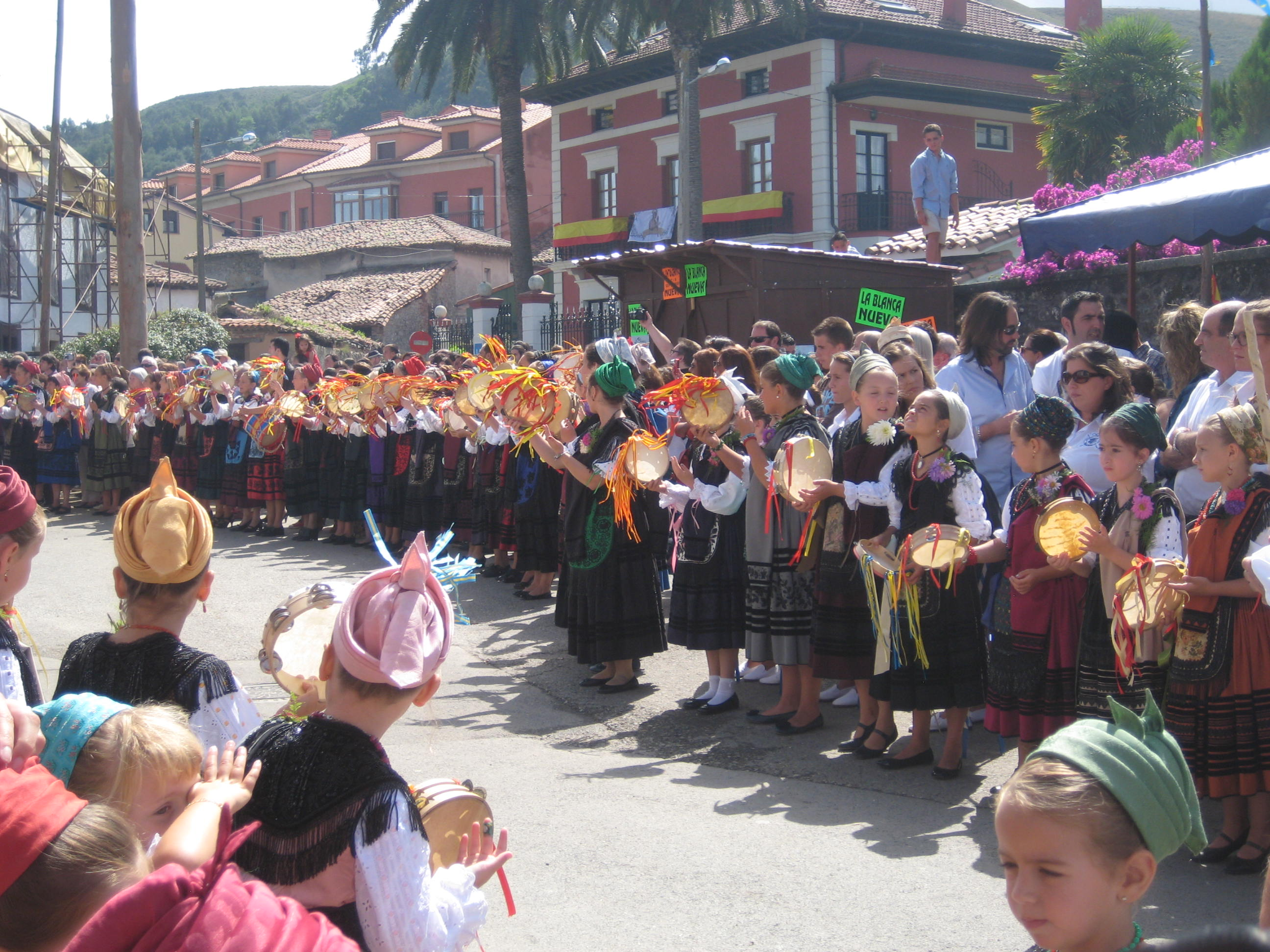 Folclore tradicional de Nueva